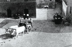 documentario Sulle orme di Giacomo Leopardi- regista Francesco Pasinetti per istituto LUCE - 1942